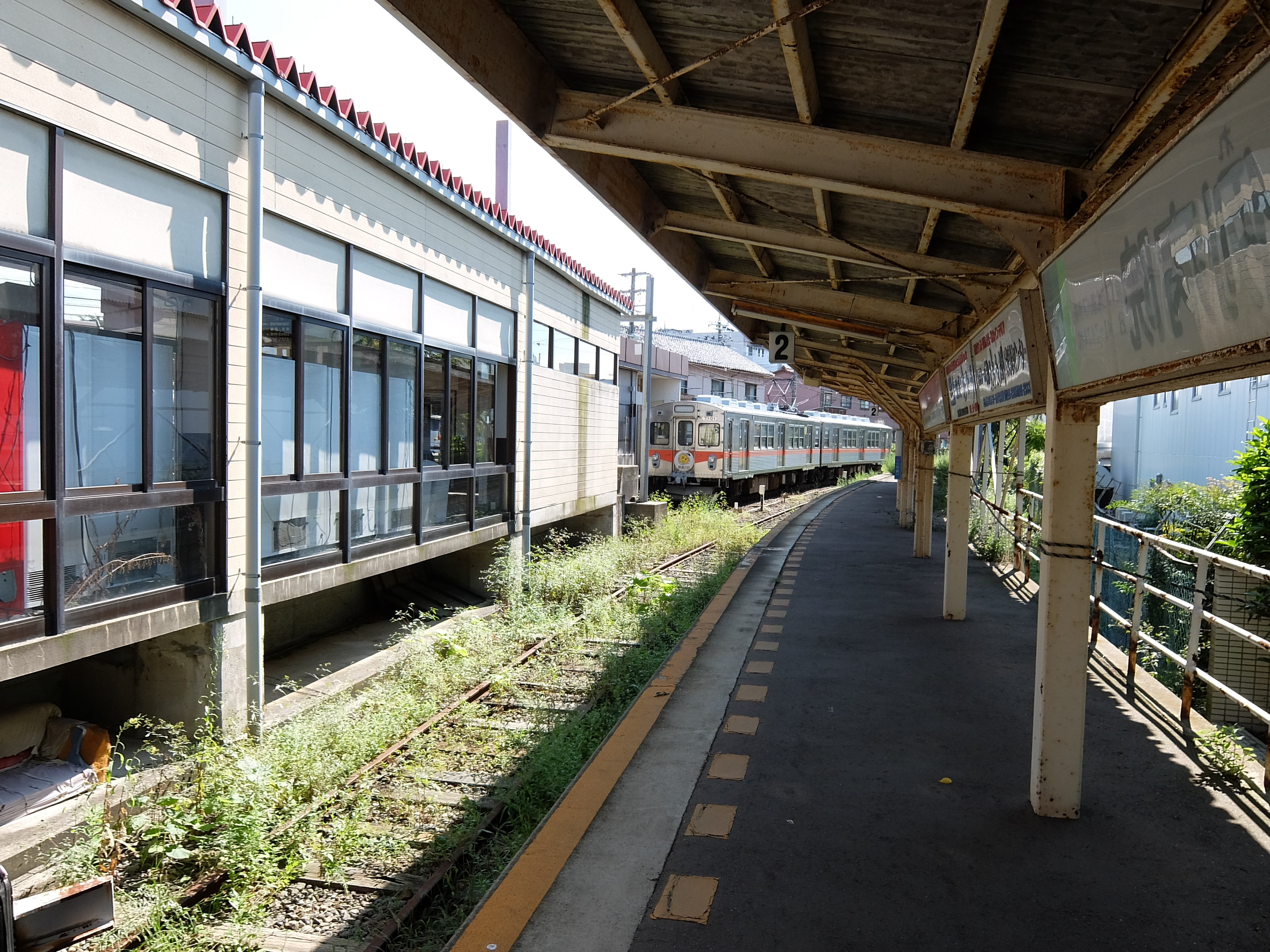 北陸鉄道 野町駅 2番線ホームと1番線に停車する列車